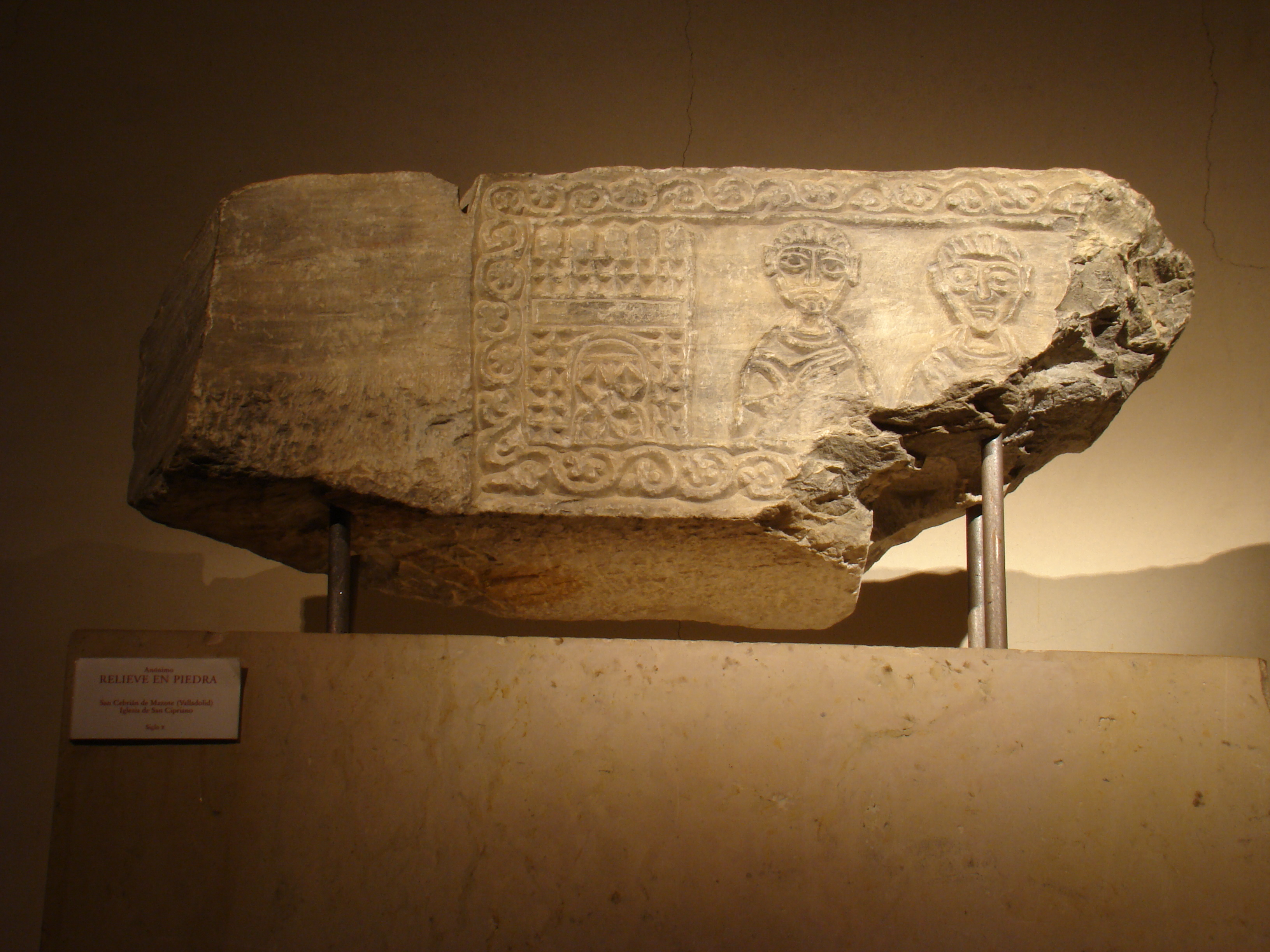 Iglesia mozárabe de San Cebrián en la localidad de San Cebrián de Mazote, Valladolid, España. Bloque de piedra de 62 X 27 cms, rescatado en la restauración de la iglesia, mozárabe, del siglo X. Representa un edificio almenado, con arcos de herradura y dos bustos de personajes bendiciendo. Puede ser parte de un dintel.